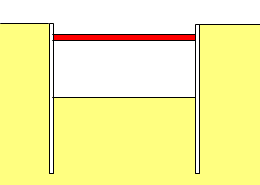 Plaatje van een bouwkuip met stempelraam, getekend door Wikipediagebruiker: GeeKaa 24 aug 2005 09:34 (CEST)